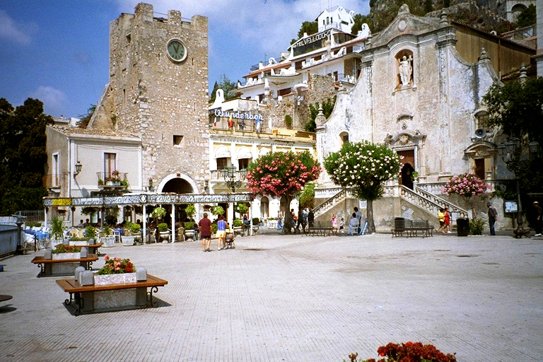 Haaptplaz zu Taormina